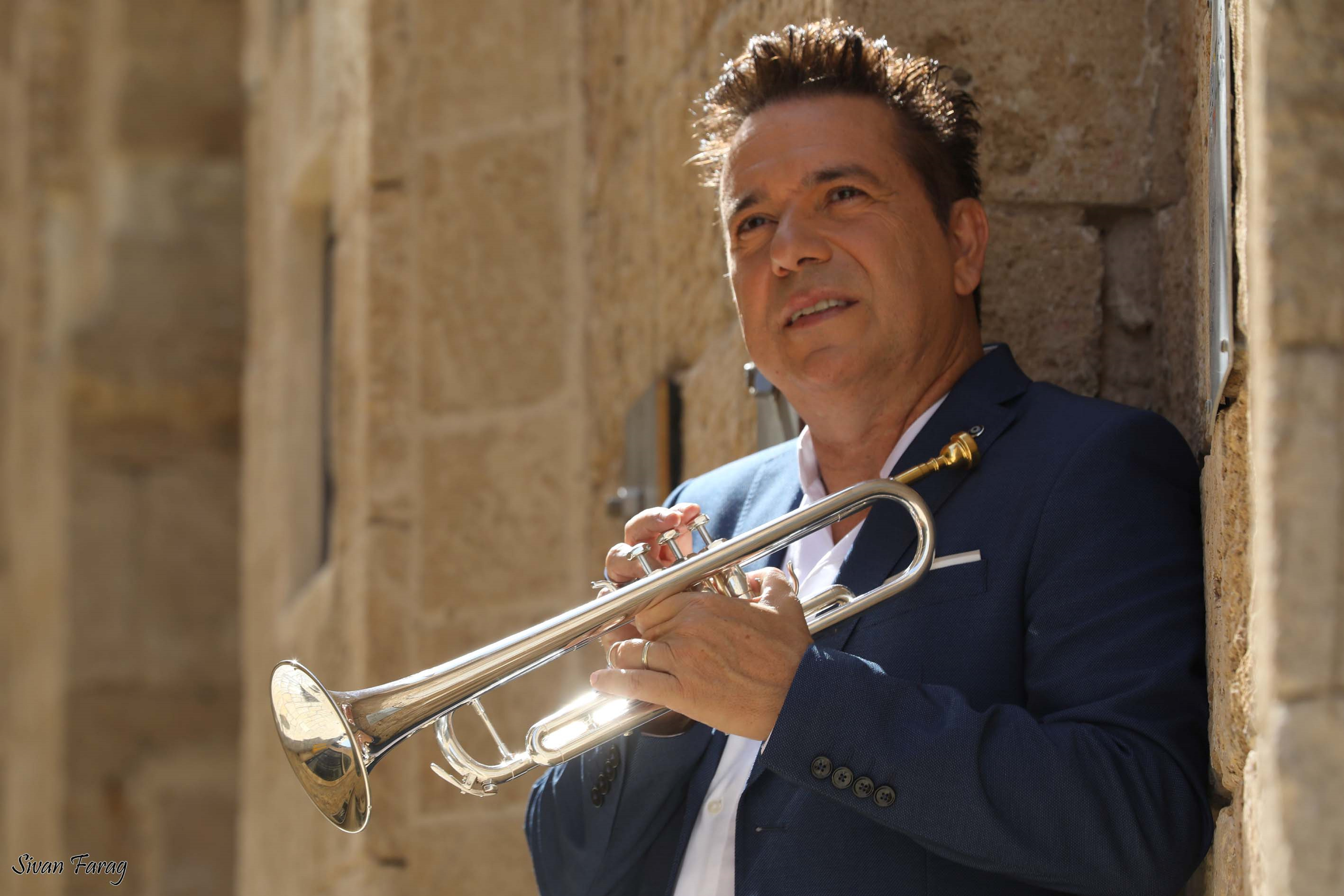 אריק דוידוב ביפו